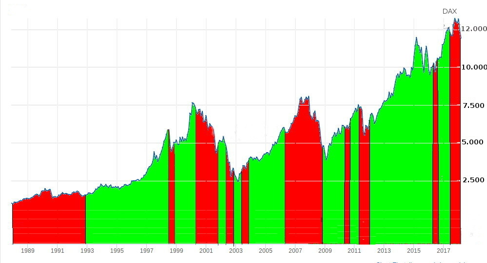 Die Gebert-Investitionsphasen (grün) im DAX von 1988 bis 2018.